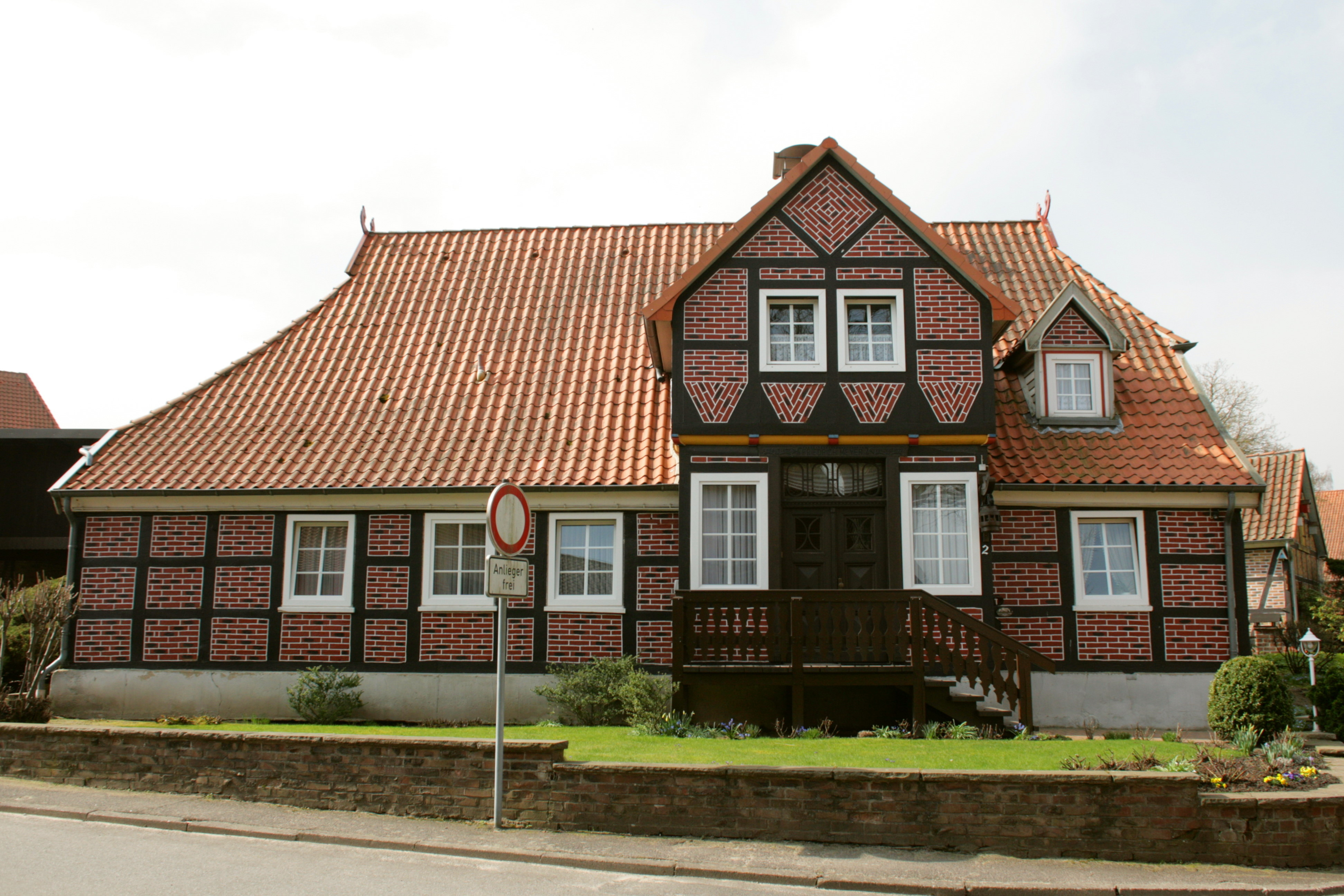 Ortsmitte, nahe der St.-Georg-Kirche in Barum (Landkreis Uelzen)